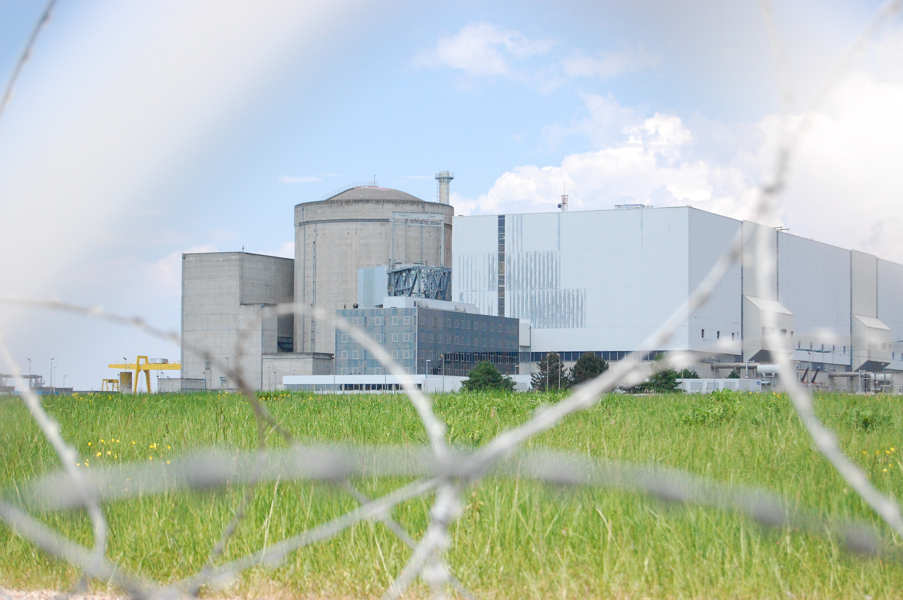 centrale nucléaire du Blayais (Gironde, France)